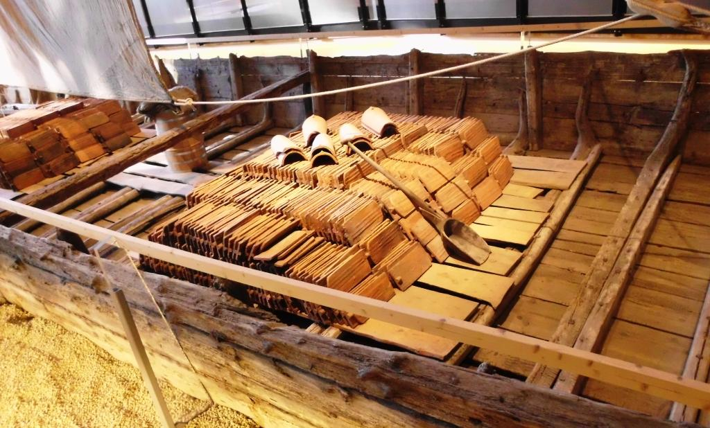 Ziegelladung dea Kaffenkahns, Technikmuseum Berlin